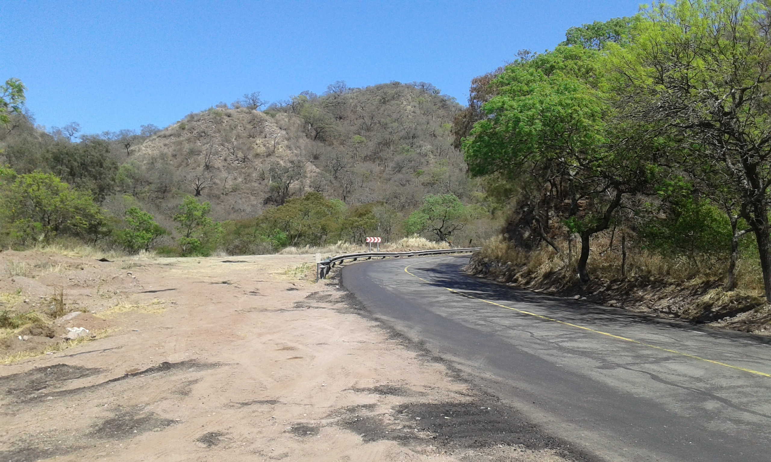 La sierra de Guasayán, atravesada por la ruta nacional 164.